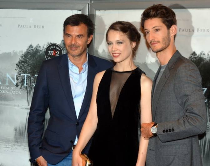 François Ozon, Paula Beer et Pierre Niney à l'avant-première parisienne de "Frantz"